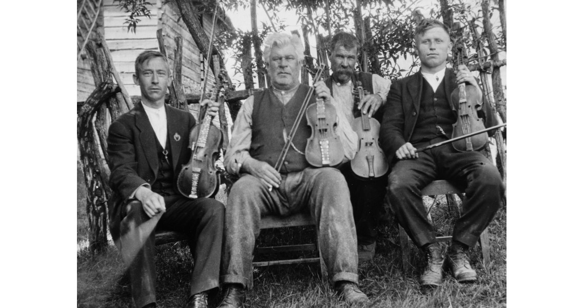 Fra venstre: Martinius Jansen, Sjur Helgeland, Olav Helgeland og Olav Borge